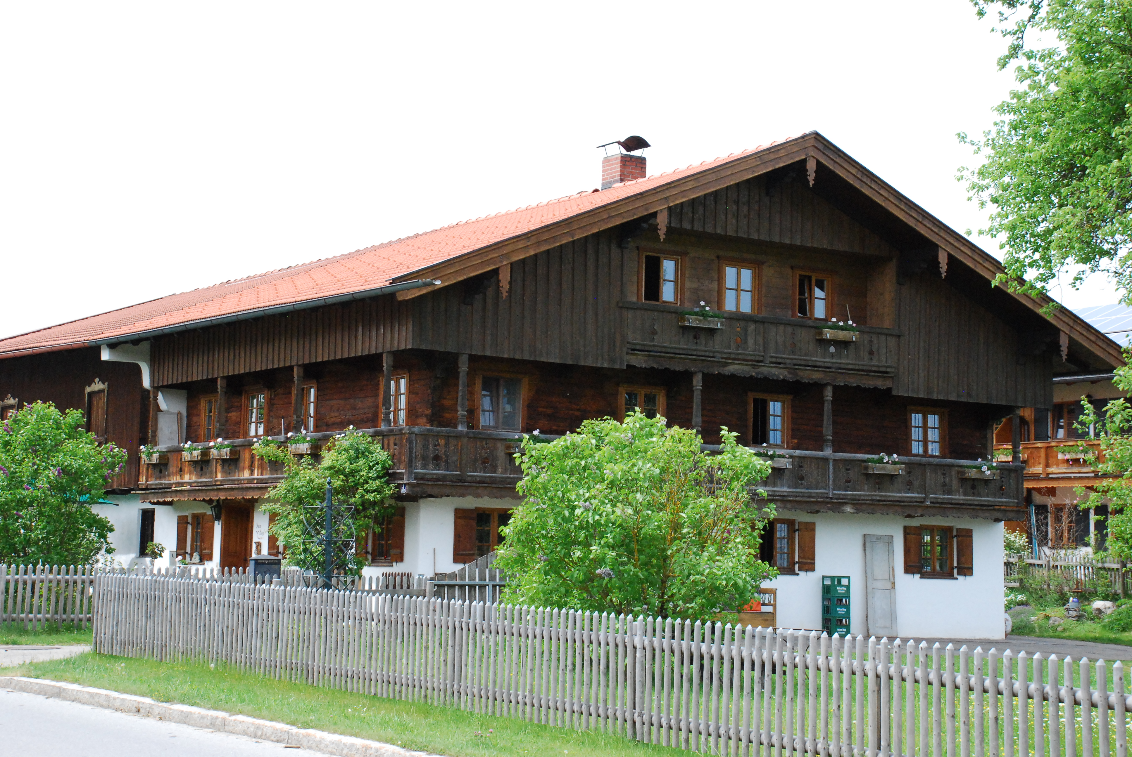 Bauerhaus Bürgermeister-Erl-Straße 3 in Schaftlach, Gemeinde Waakirchen, Landkreis Miesbach, Regierungsbezirk Oberbayern, Bayern. Als Baudenkmal in der Bayerischen Denkmalliste aufgeführt.